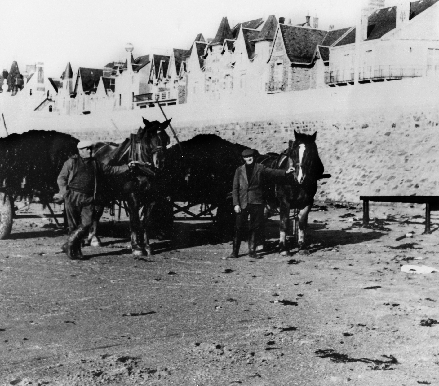 Ramassage du goémon sur la plage des Sables d'Olonne par les maraîchers de La Girvière, dans les années 1940. Eugène Cloutour est la personne à droite de la photo